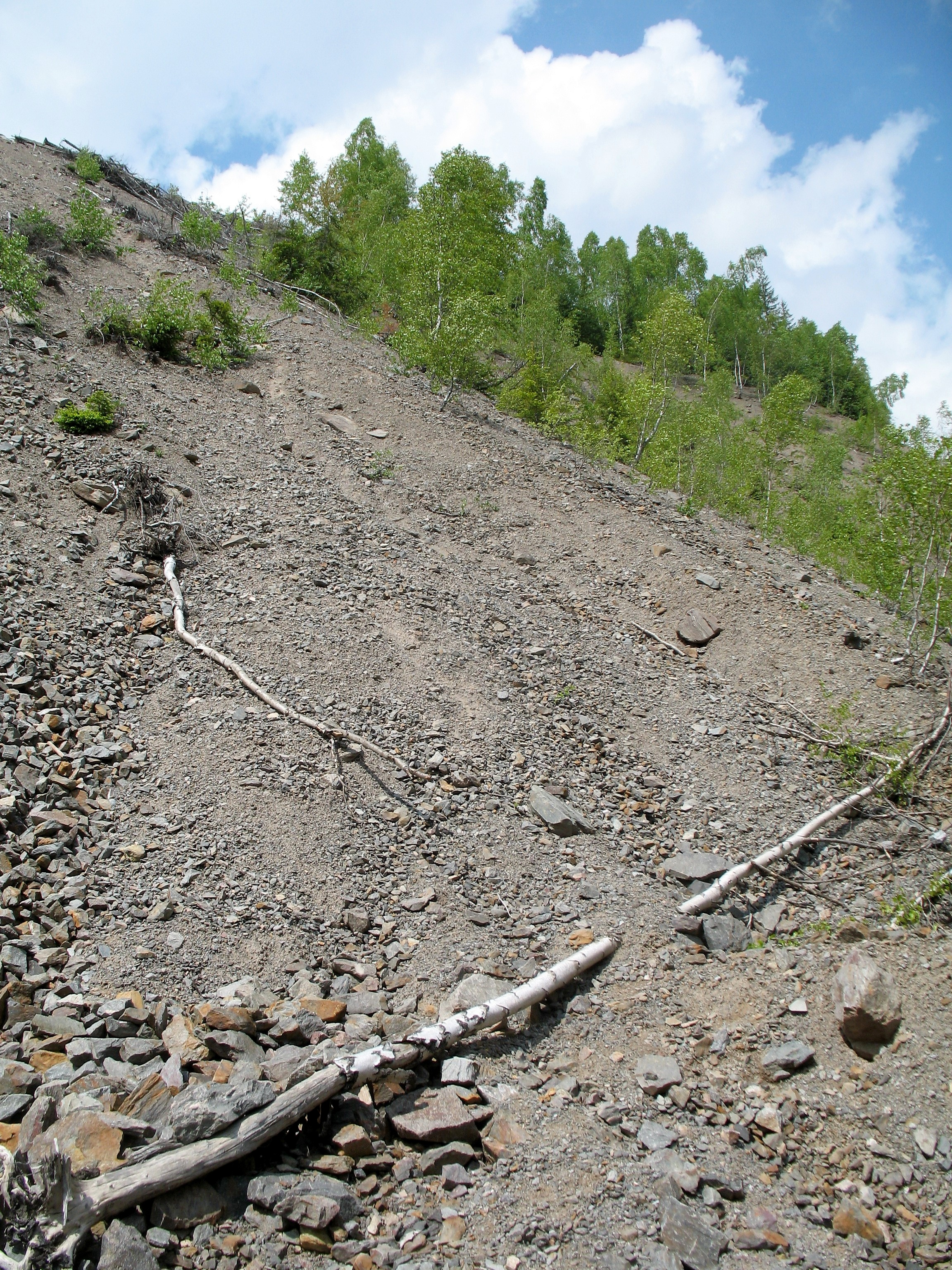 Halda uranového dolu Eva (někdejší důl Eva Apfelbaum) v Zálesí u Jáchymova